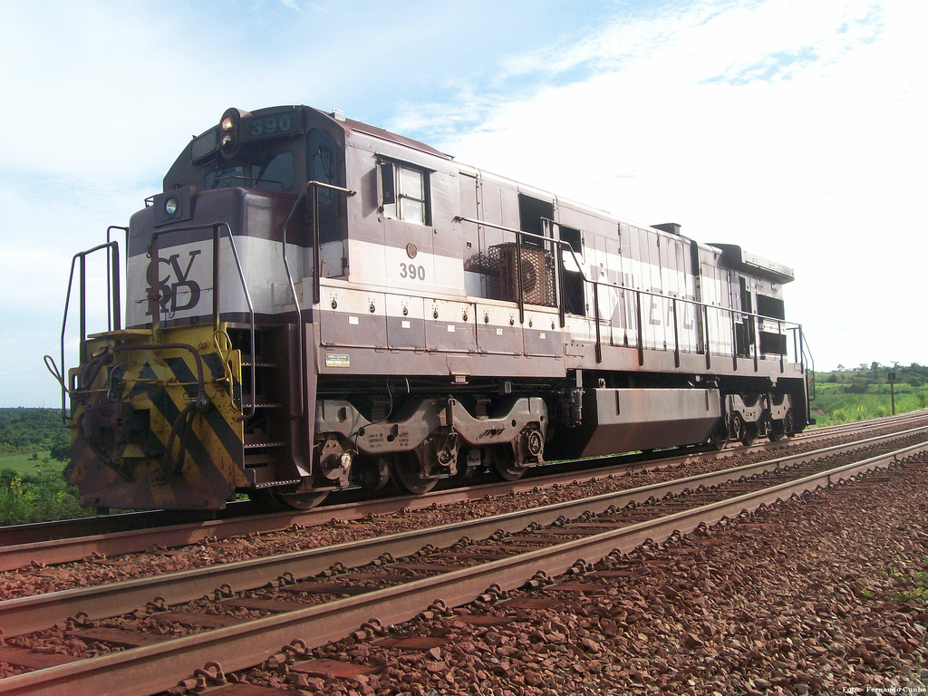 EFC 390 (1º Padrão de Pintura), GE C36-7 - MA - Brasil